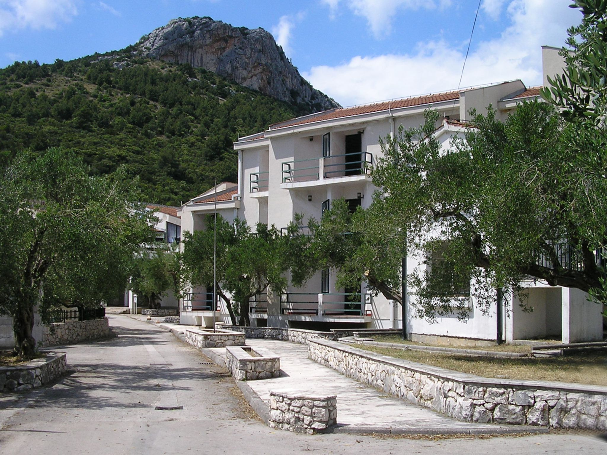 Klek (Slivno)